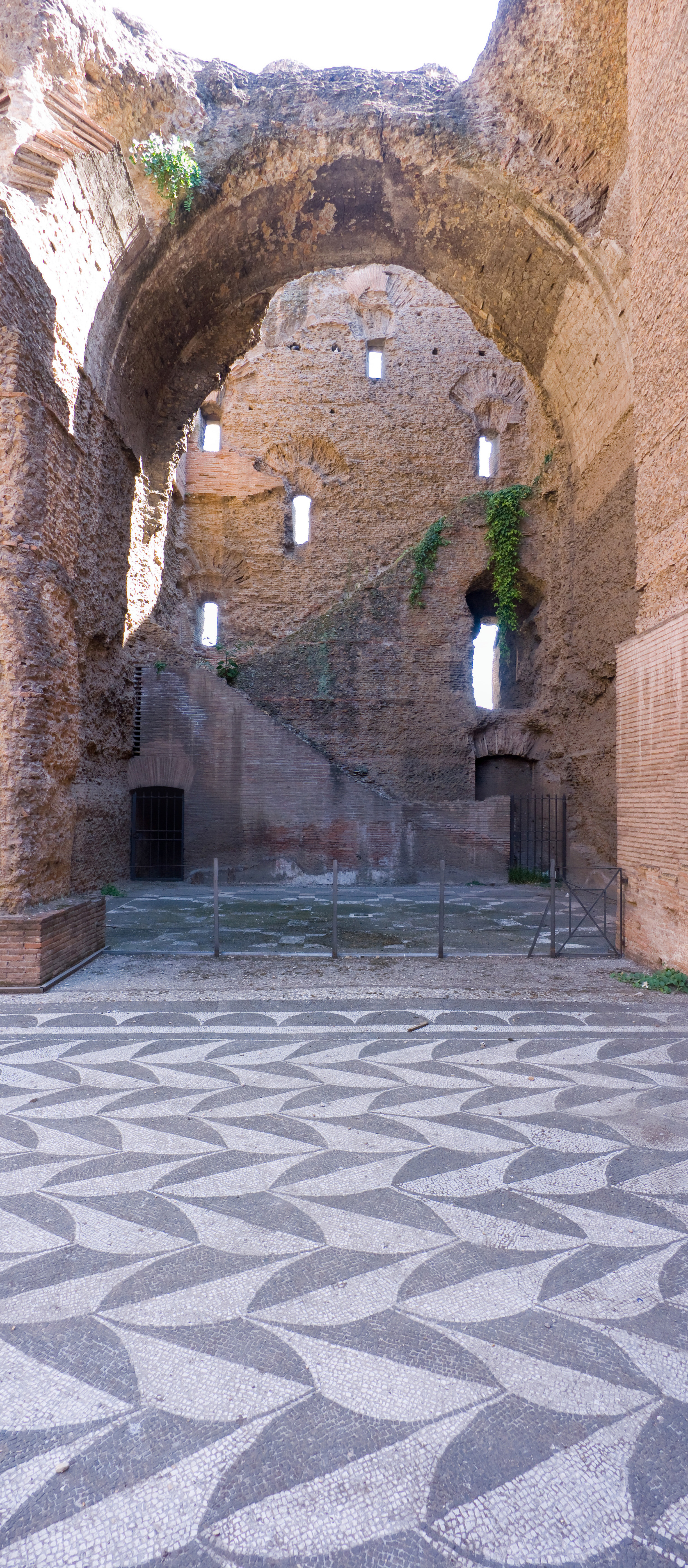 Rome. Thermes de Caracalla. Escalier et mosaïques